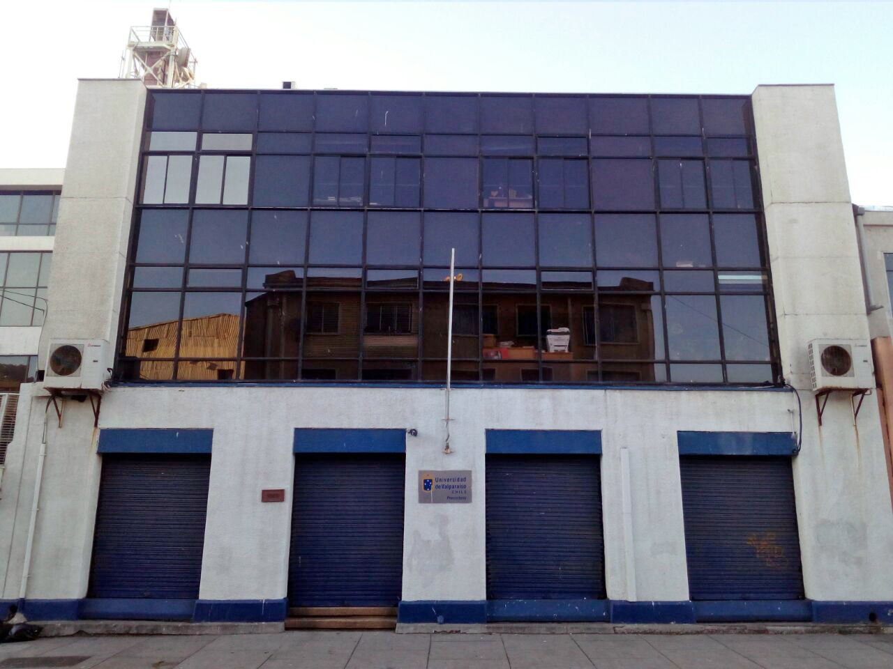 Edificio de Prorrectoría de la Universidad de Valparaíso. Calle Blanco, entre Las Heras y Carrera, Valparaíso, Chile